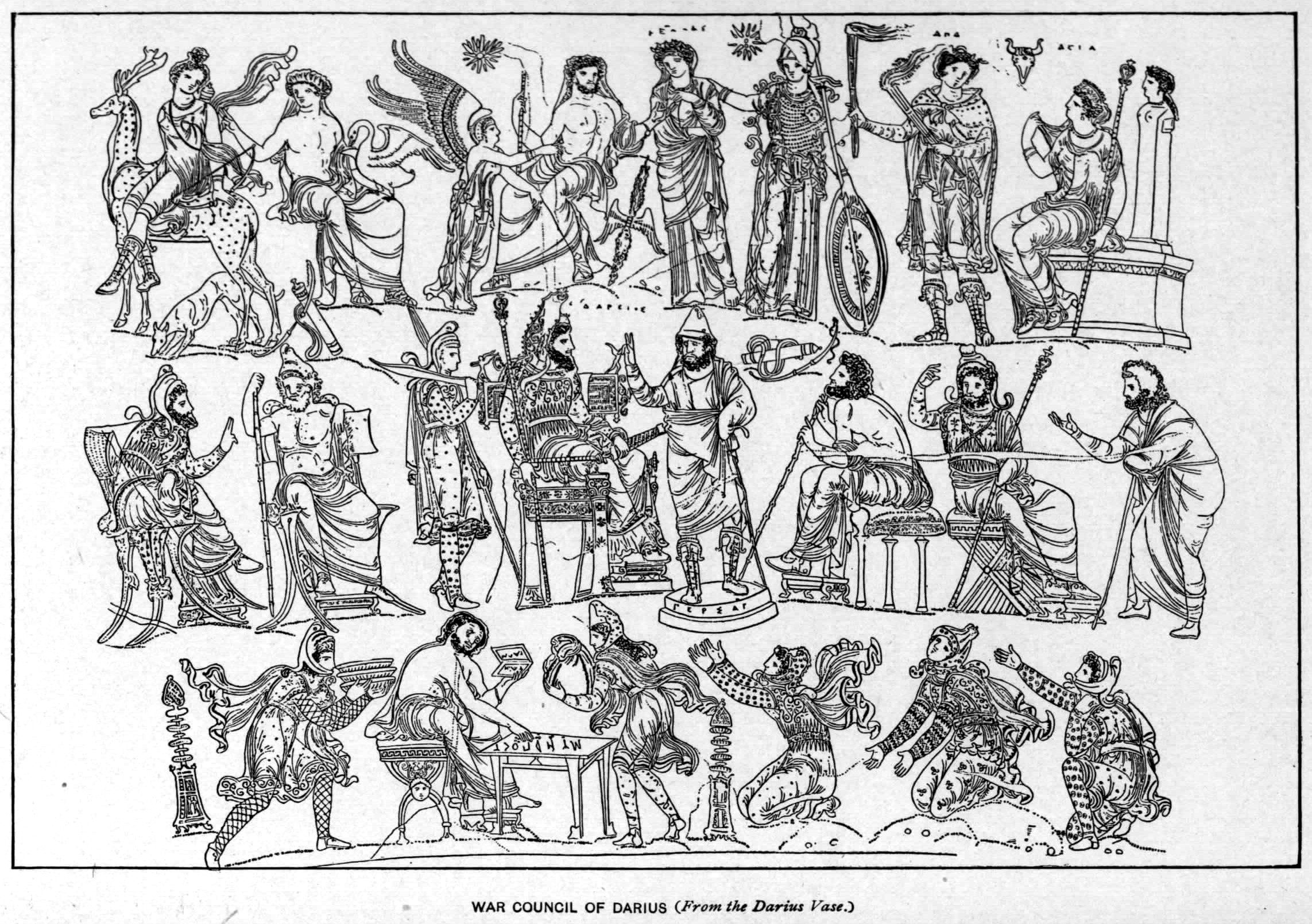 Alexander old drawings